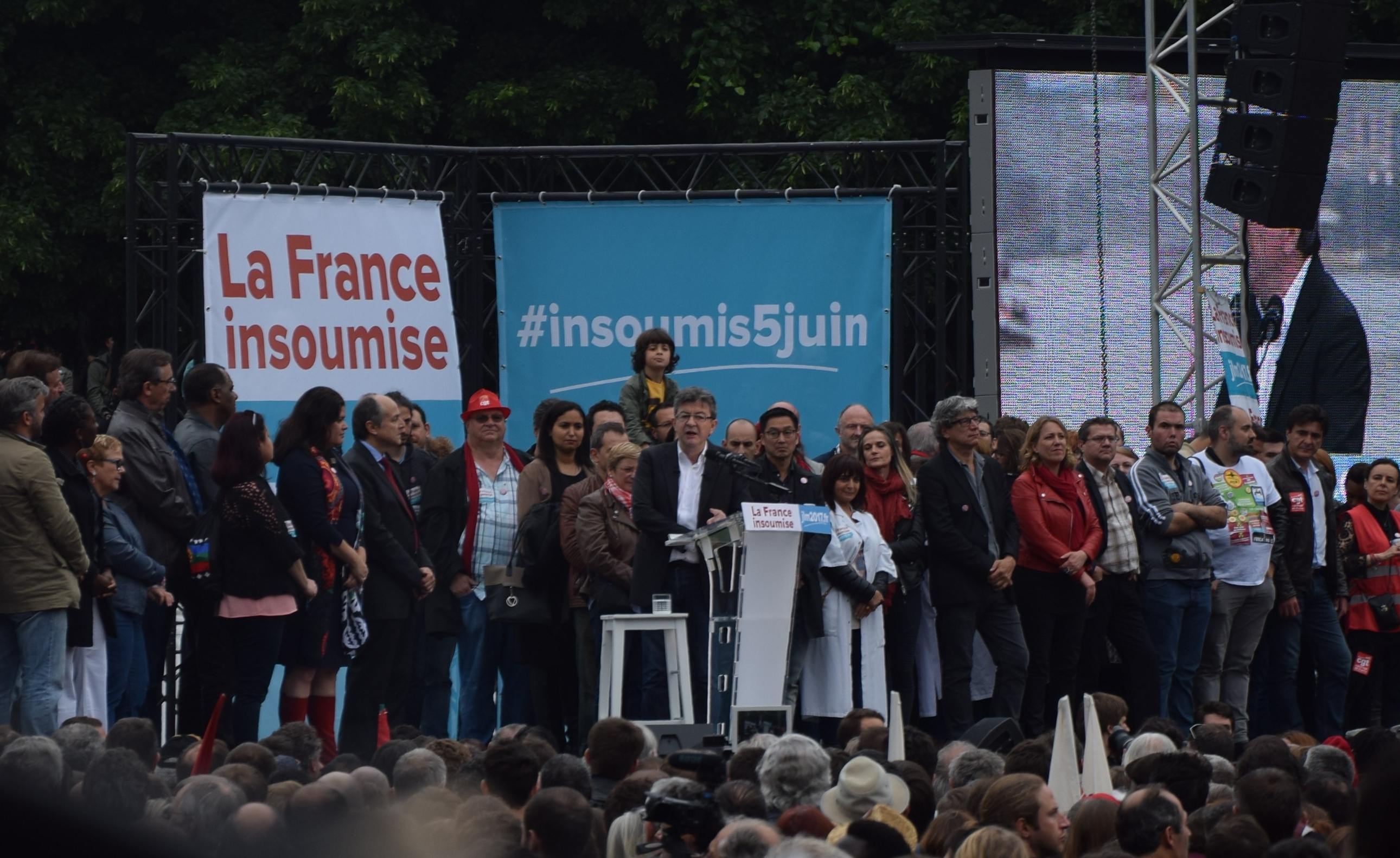 Le 5 juin 2016, se tient place Stalingrad à Paris, le "défilé de la France insoumise", suivi du discours de Jean-Luc Mélenchon, premier de la campagne présidentielle 2017.